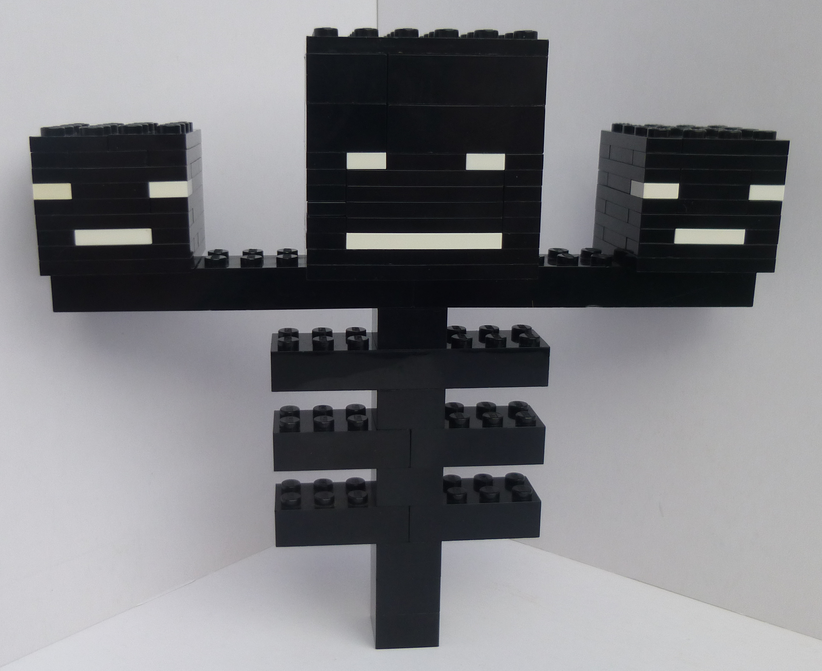 By Ben